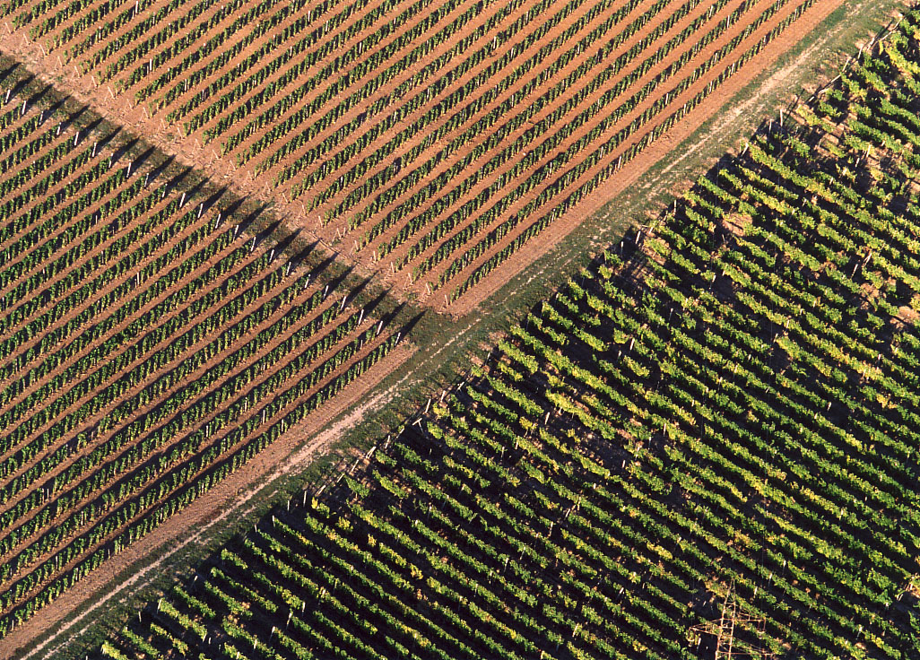 Tokaj-Hegyalja - Hungary - Europe